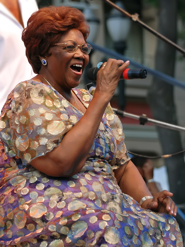 Foto: Natalia Bezerra.